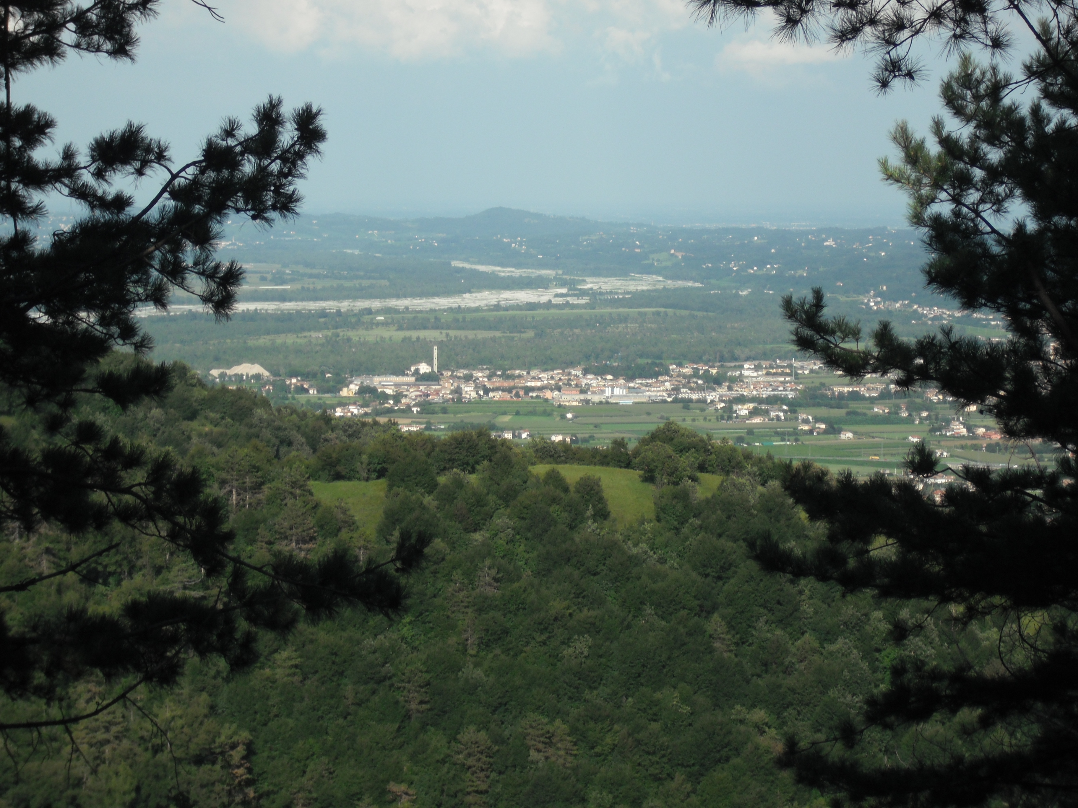 Crocetta del Montello vista dal Collalto.